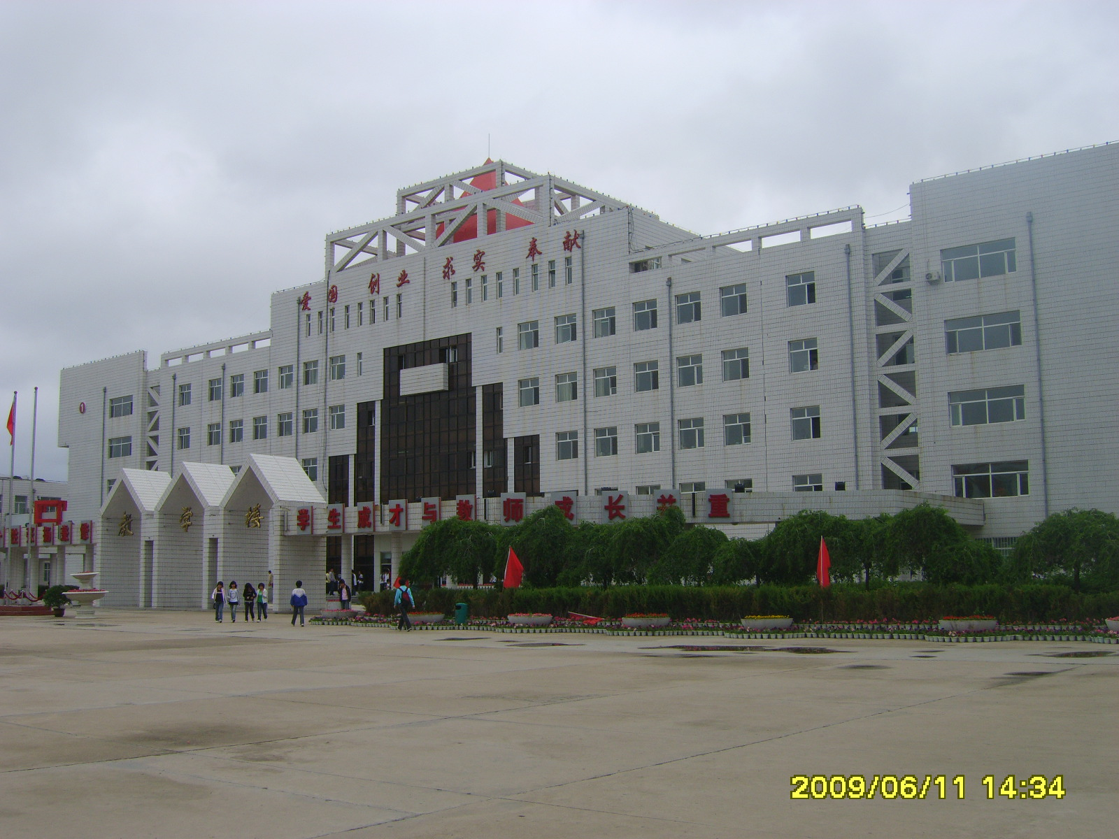 黑龙江省大庆市第一中学的高中部主教学楼